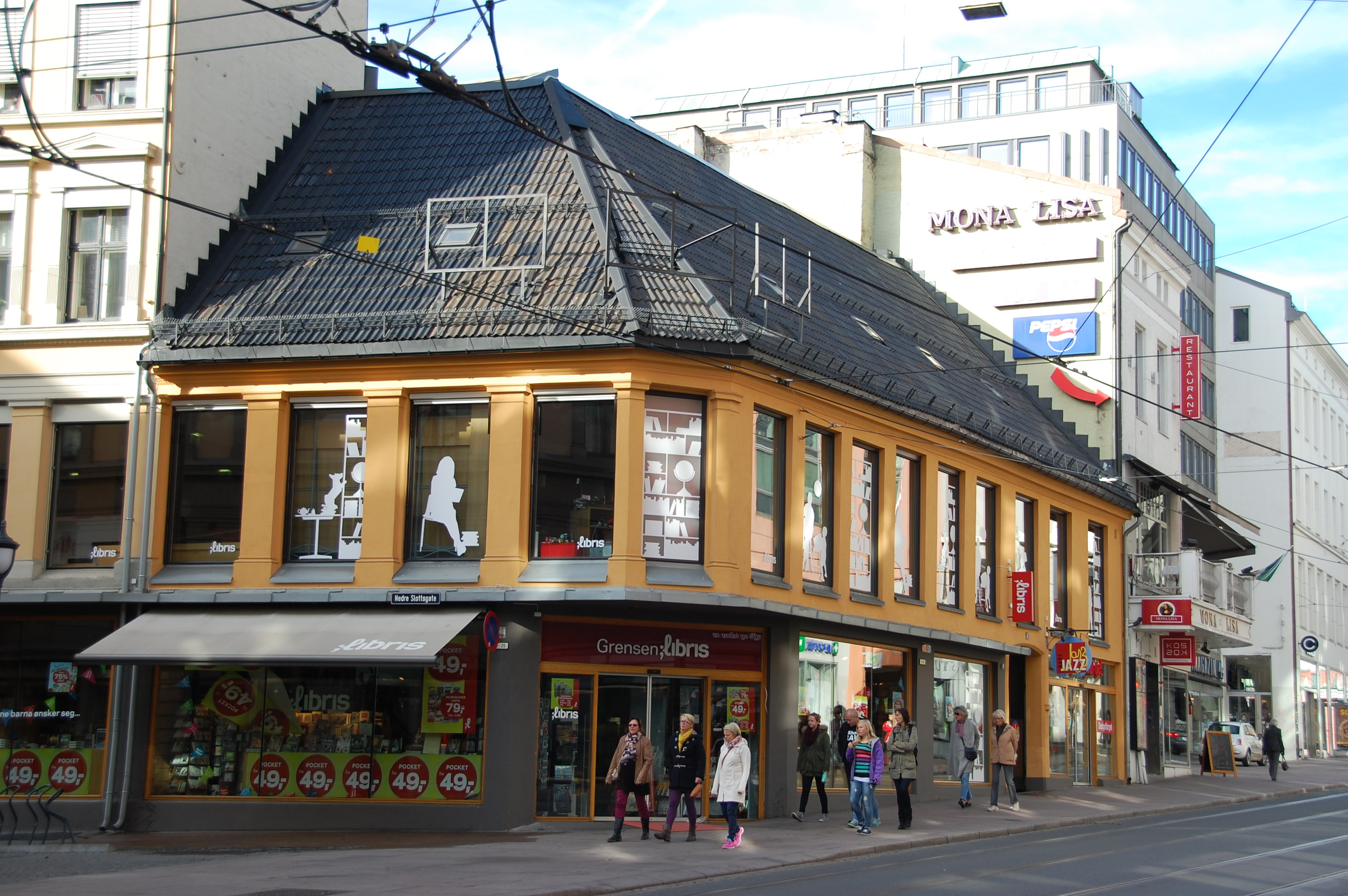 Grensen 8, Kjøpman Kjos´ gård. Gammel kjøpmannsgård, den toetasjes gården mot gaten kan spores tilbake til 1700-tallet.